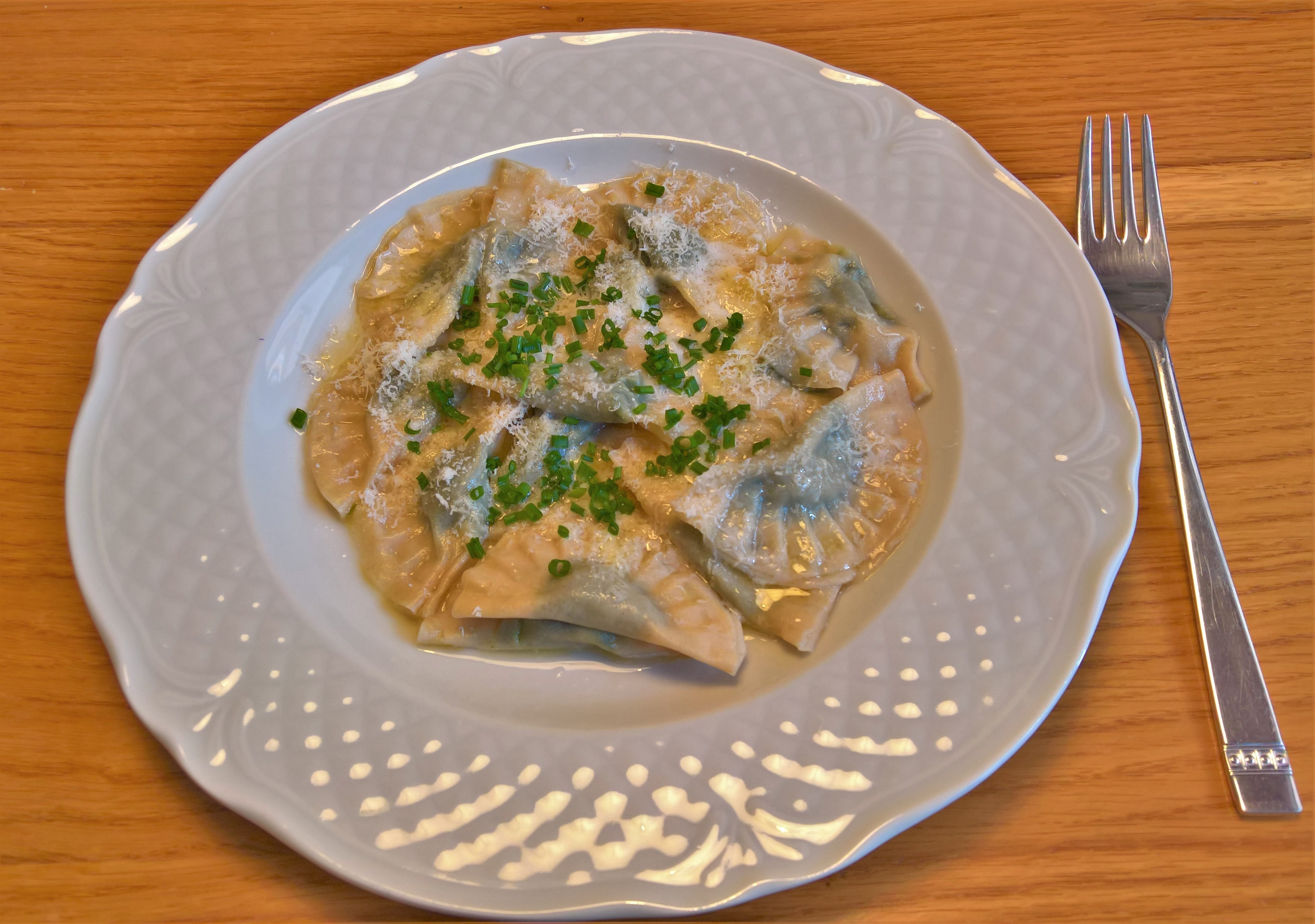 Schlutzkrapfen, klassisch serviert mit geschmolzener Butter, Parmesan und Schnittlauch